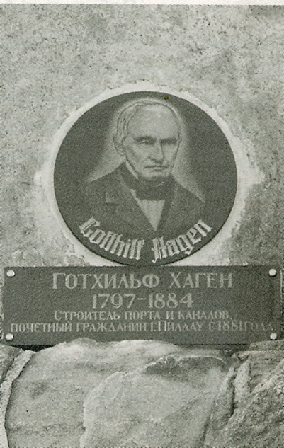 Denkmal über Gotthilf Hagen (1797 - 1884)aus Pillau, den heutigen Baltijsk, Wasserbaudirektor aus Königsberg und Berlin Urhebers des “Hagen-Poiseuille´schen Gesetzes”